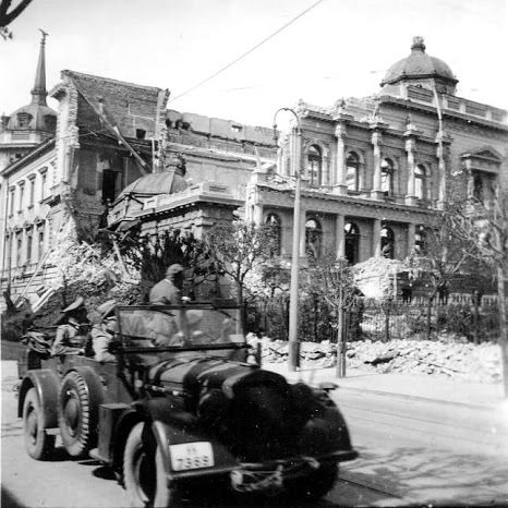 Фотографије бомбардованог Београда 06. 04. 1941. и улазак окупатора у Београд априла 1941.